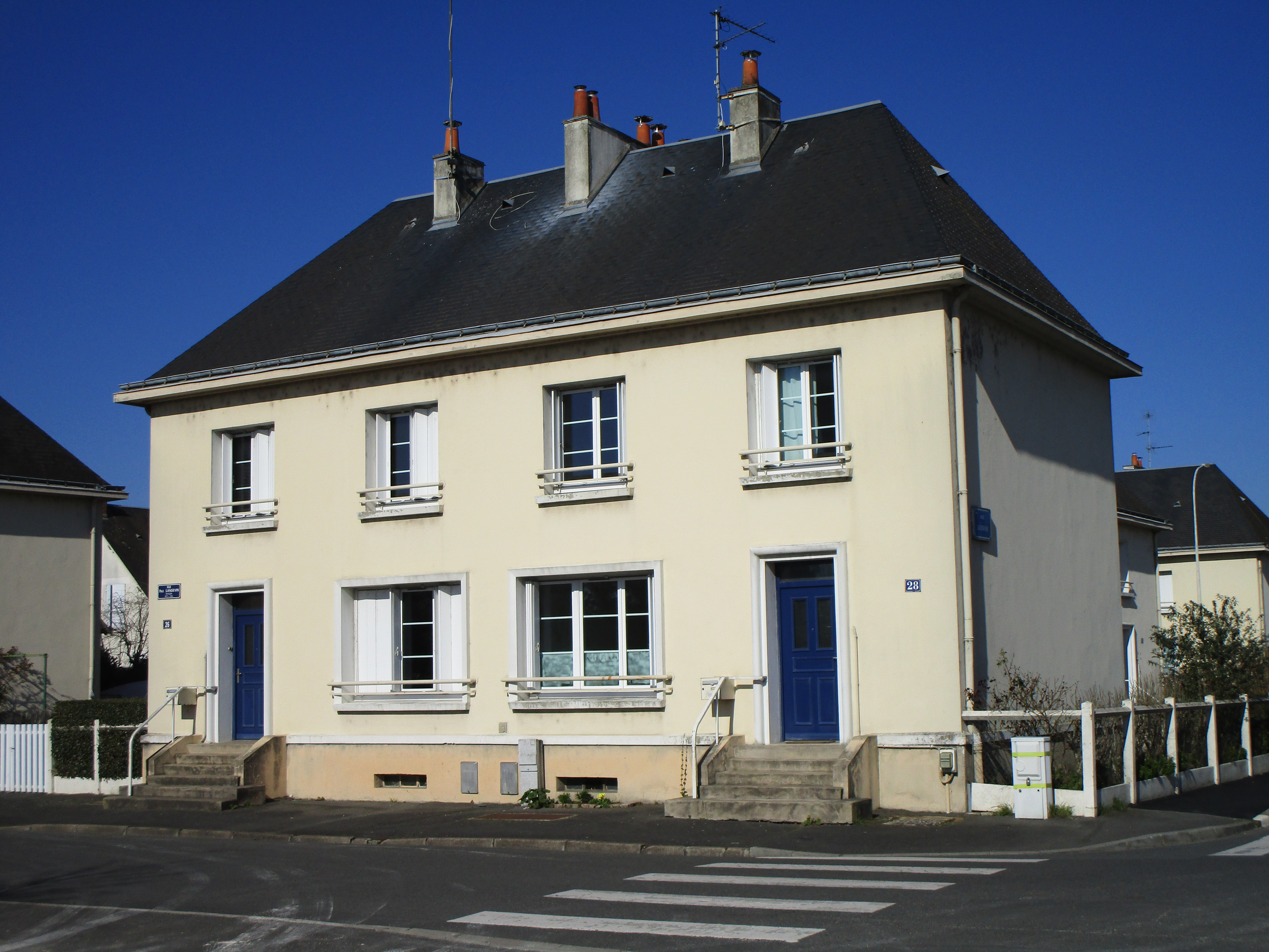 La cité ouvrière des Bords de Cher, dans le quartier Beaujardin de Tours.